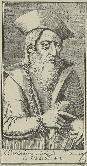 Verdadeiro retrato de Francisco de Saa de Miranda, grabado publicado al frente de Poesias de Francisco de Sá de Miranda, Halle, 1885. Biblioteca Nacional de Portugal